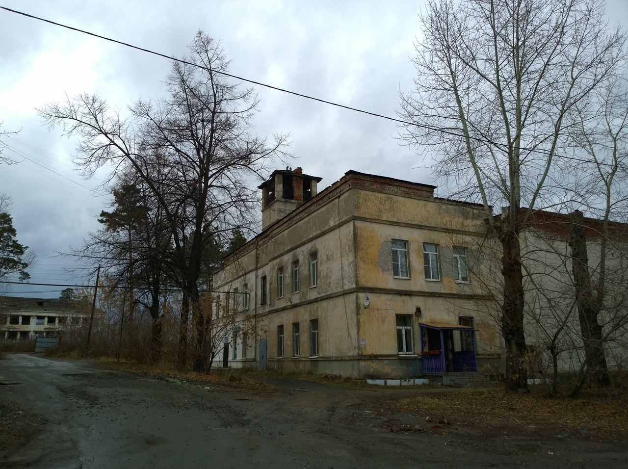 Вид на полузаброшенную пожарную часть